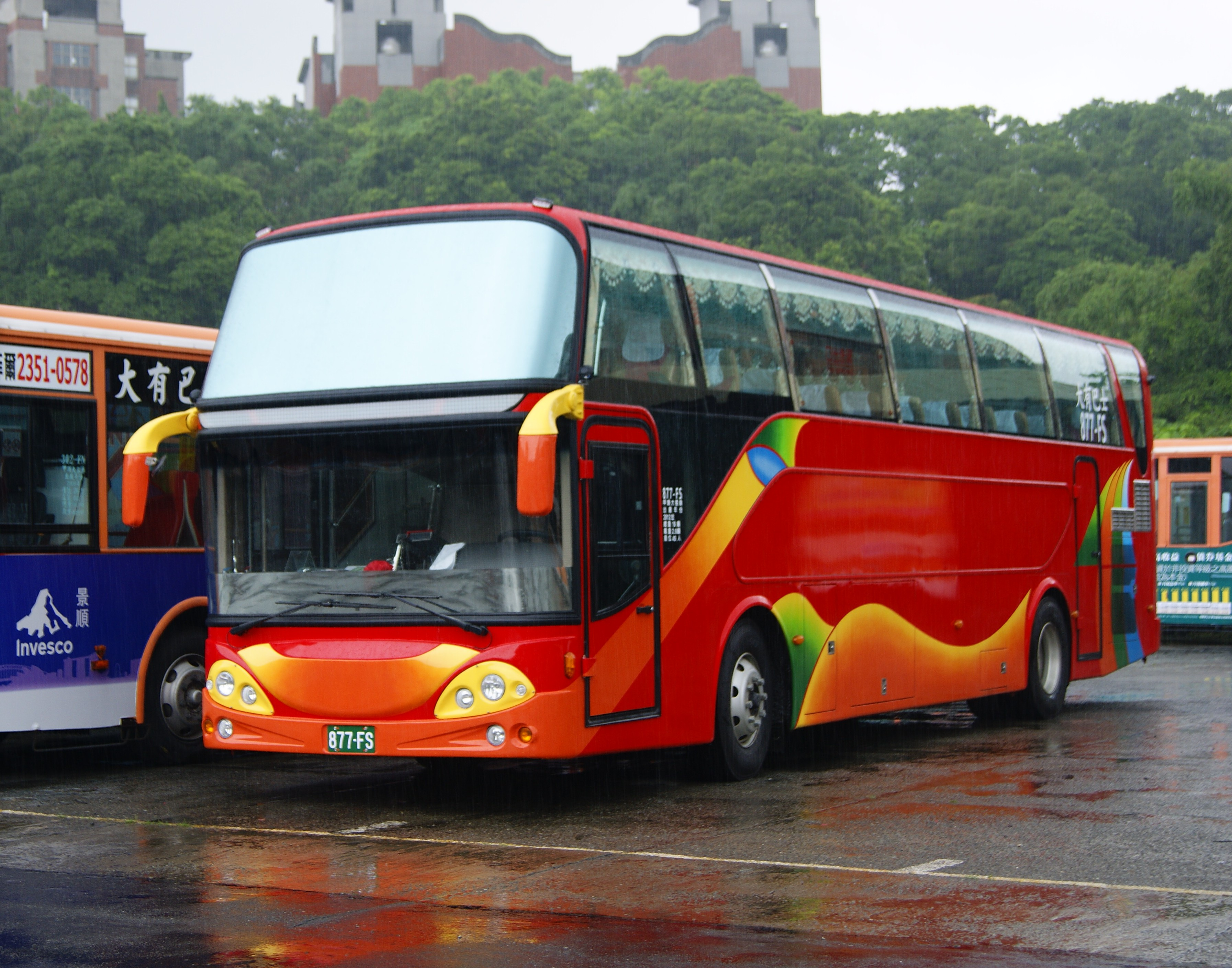 大有巴士國道用車877-FS